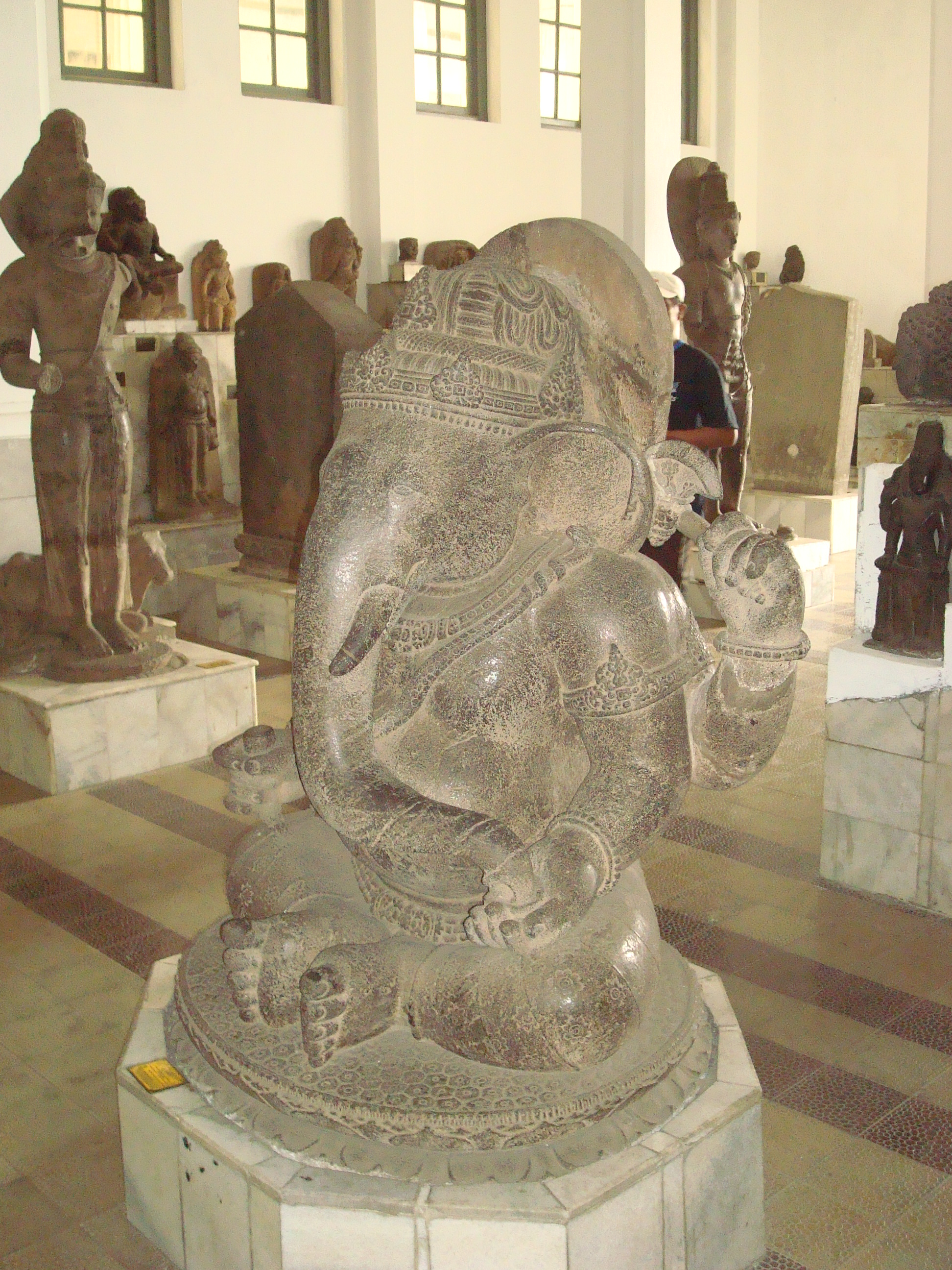 Im Nationalmuseum Indonesiens